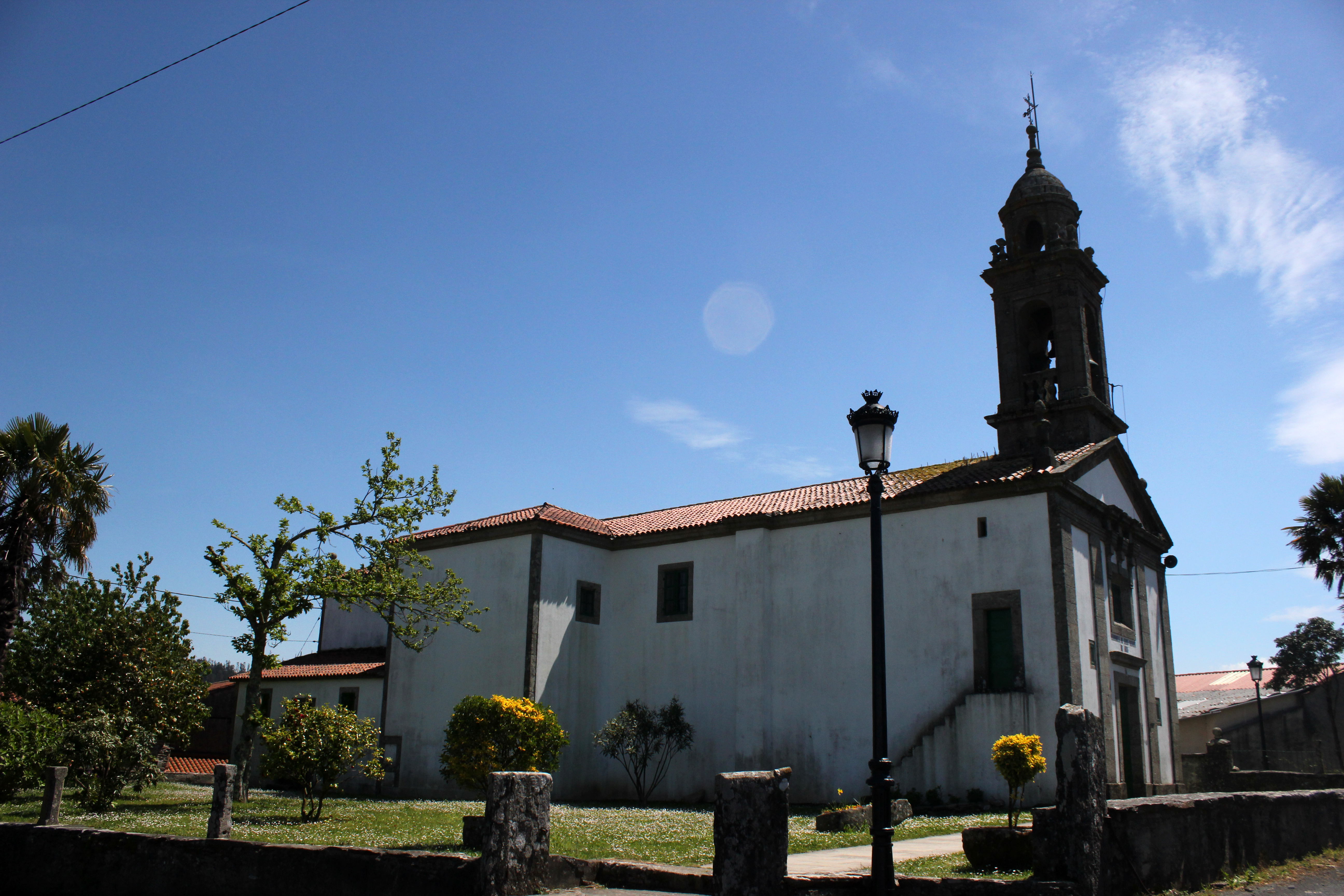 Igrexa de Santaia de Arca, no concello do Pino.